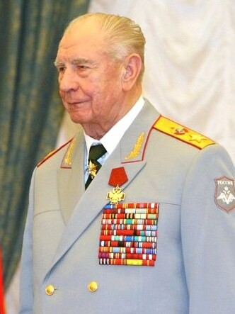 Маршал Советского Союза Дмитрий Тимофеевич Язов